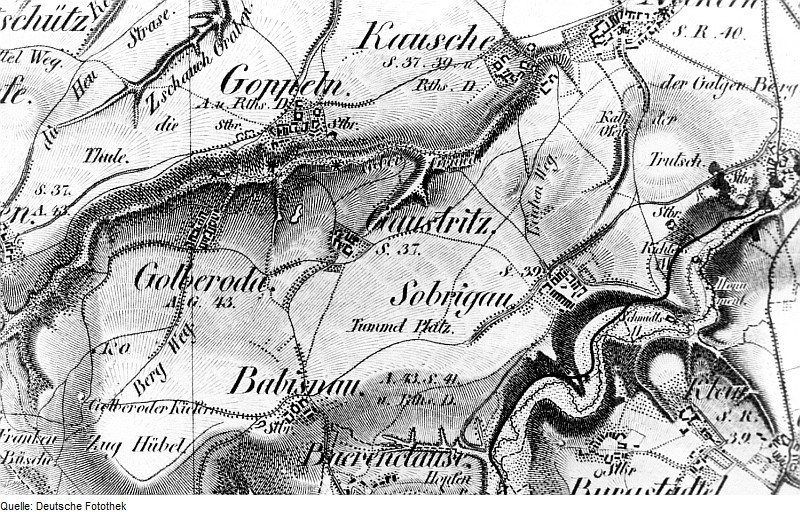 Original image description from the Deutsche Fotothek Bannewitz-Goppeln. Oberreit, Sect. Dresden, 1821/22